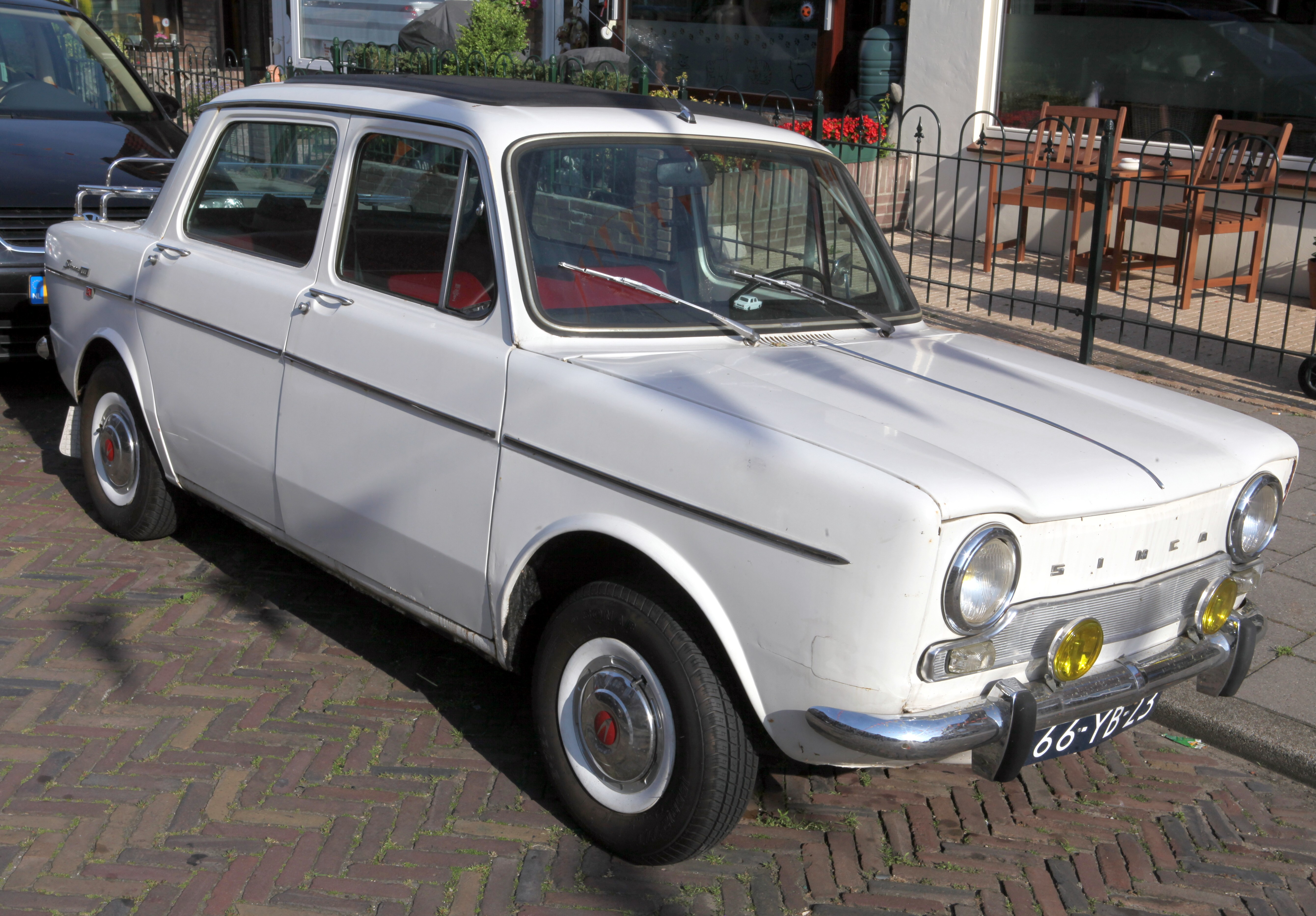 Simca 1000 GL automatic